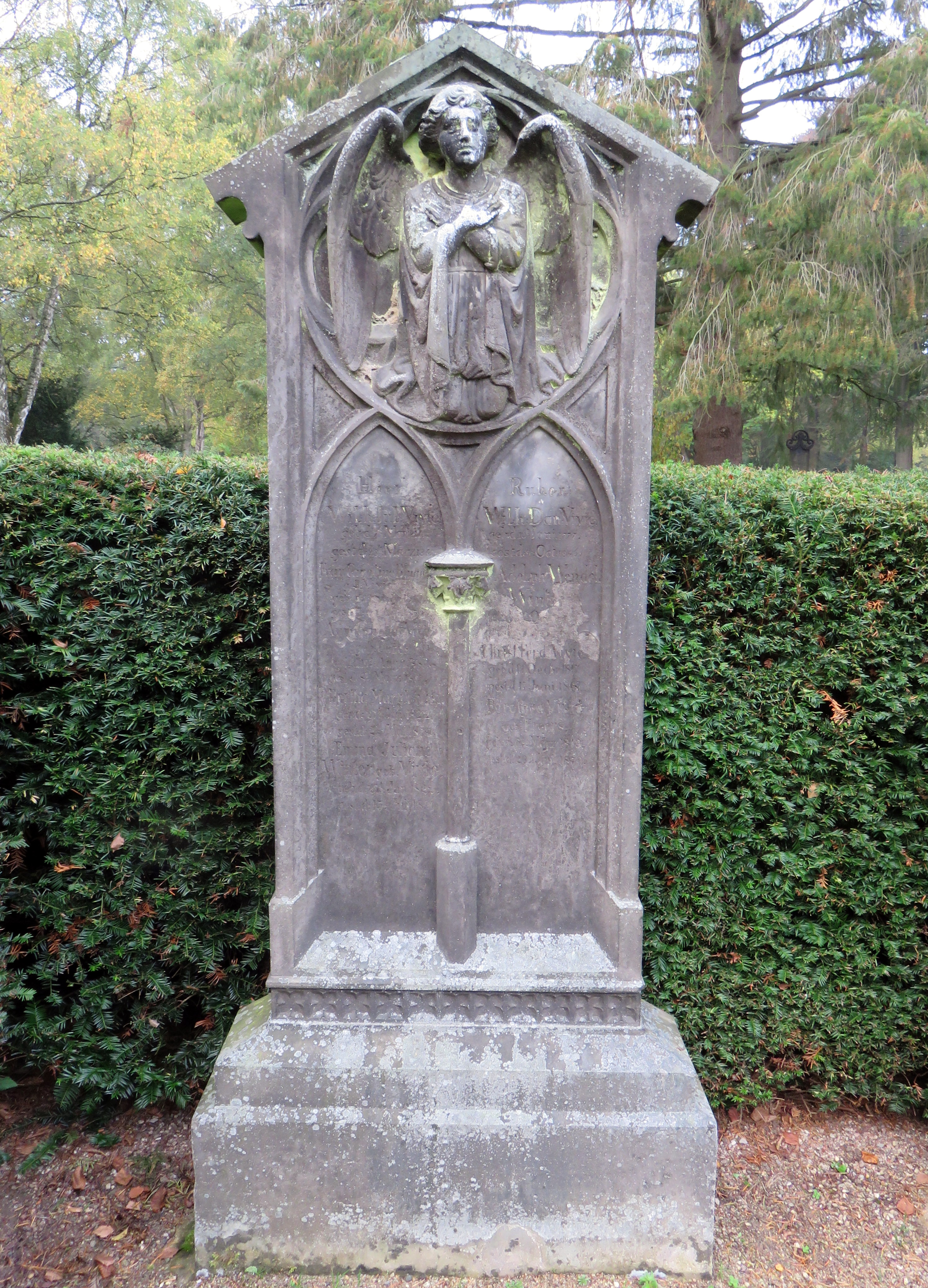 Sandstein-Stele Vivié (1842 oder 1846) im Grabmal-Freilichtmuseum Heckengarten, Friedhof Ohlsdorf. Das Grabmal wurde vom deutschen Bildhauer Ernst Gottfried Vivié geschaffen, dem Sohn des im Schriftfeld angegebenen Wilhelm Daniel Vivié († 1846).